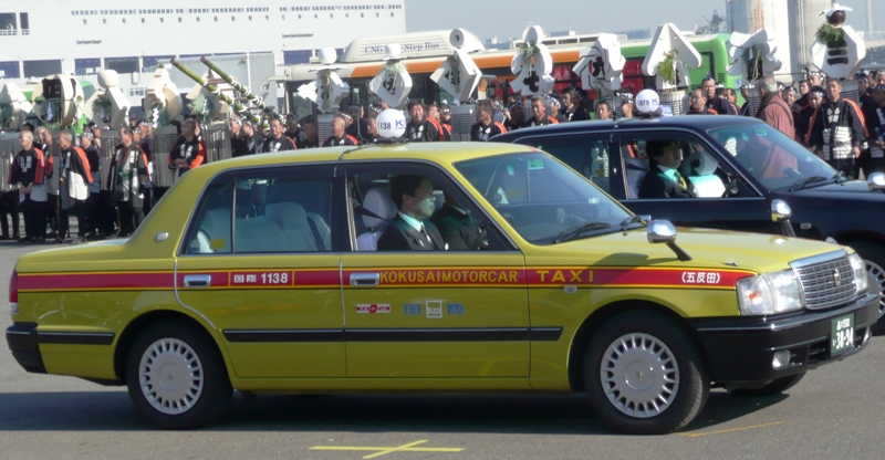 国際自動車のクラウンセダン。東京消防出初式にて撮影。